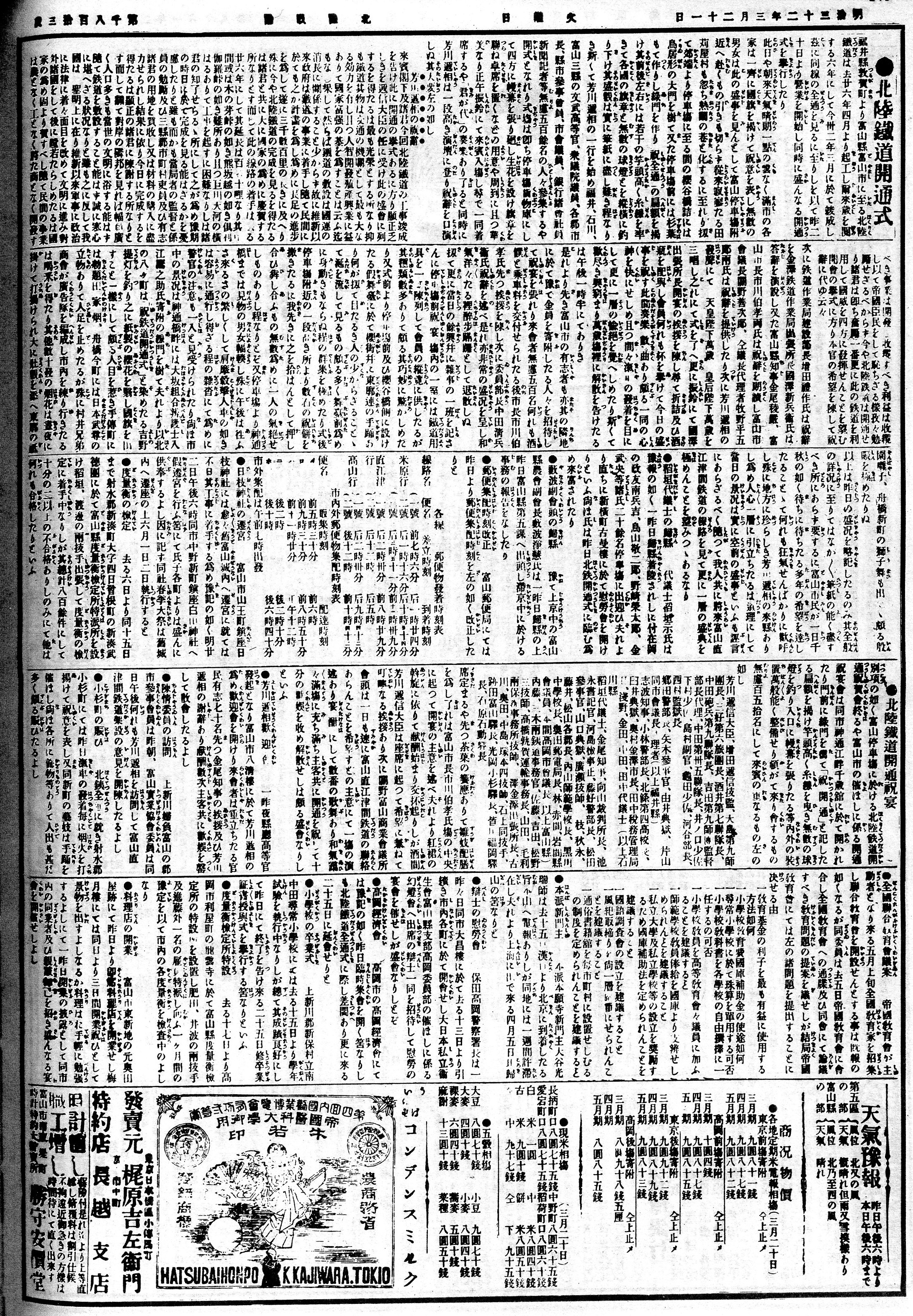 1899年（明治32年）3月20日富山 - 高岡間開業を報道する新聞